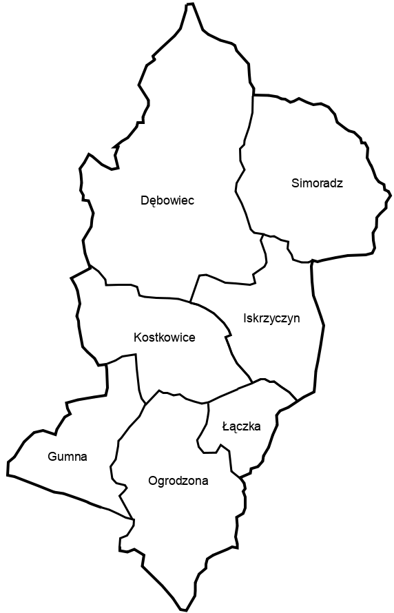 Sołectwa gminy Dębowiec (śląskie, cieszyński)